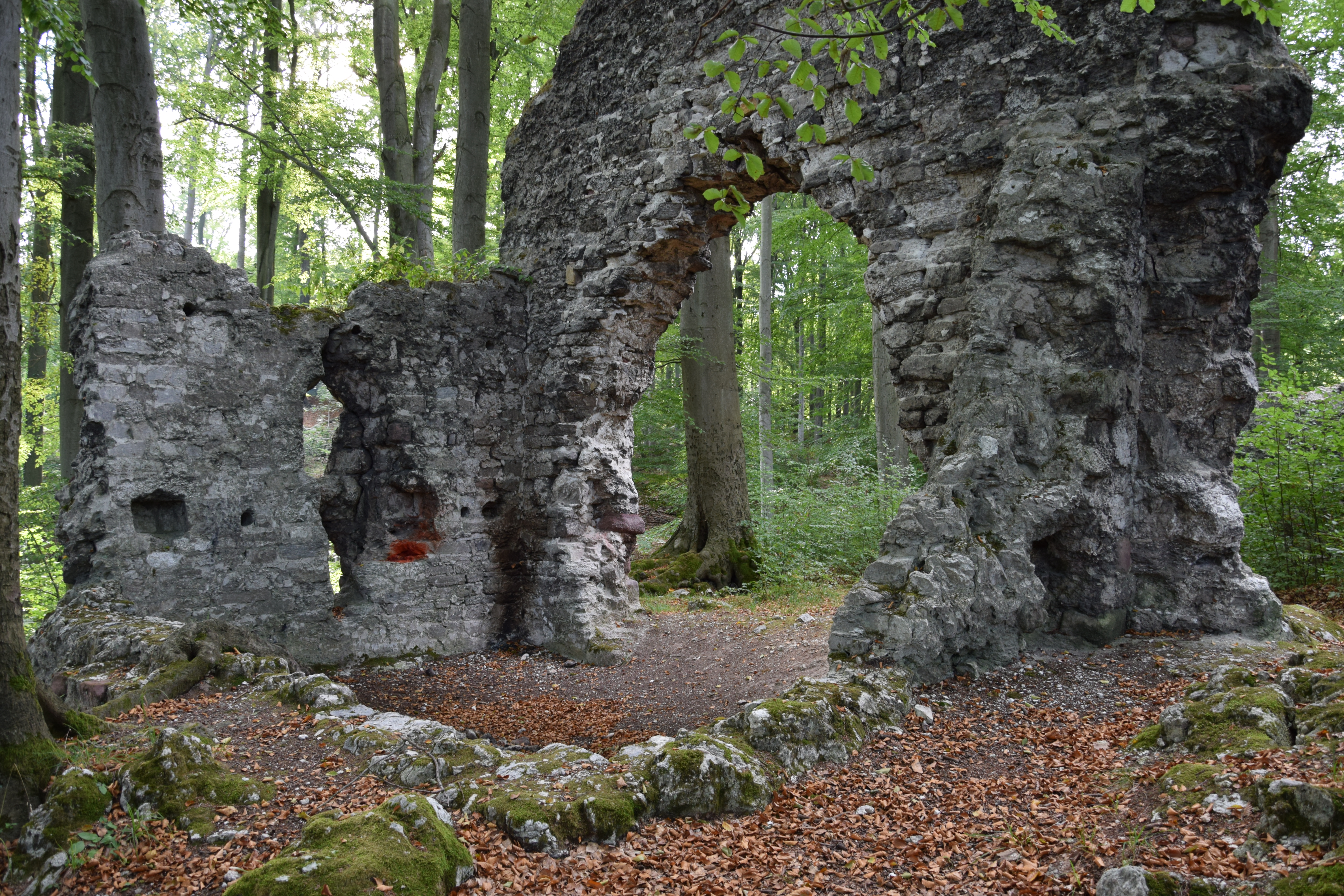 Die Grasburg bei Rottleberode - Chor